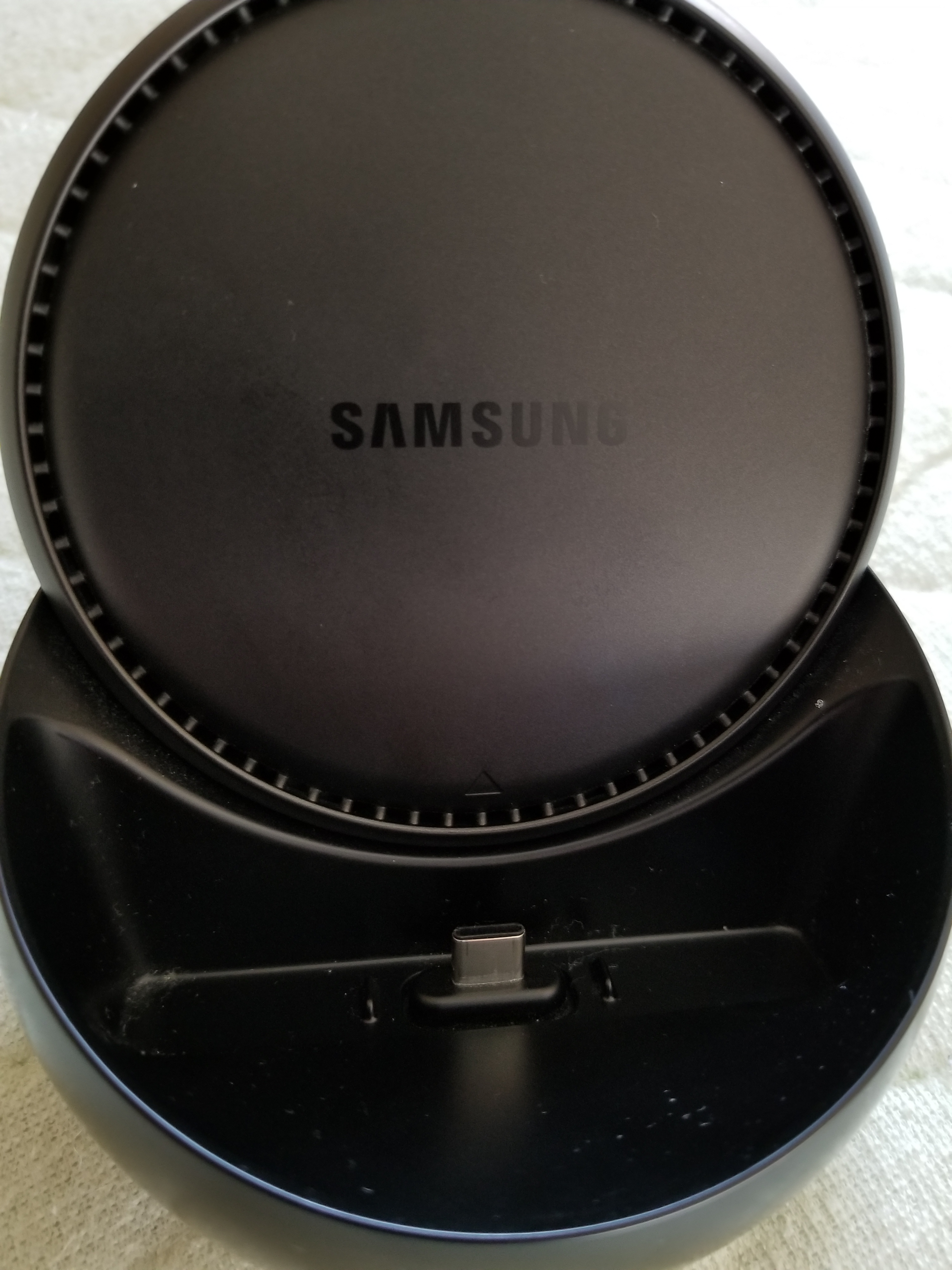 DeX Stationのふたを開けた状態。